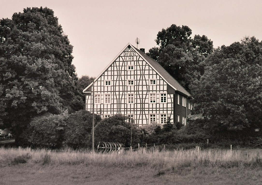 Hof Waskönig (Hackstückstr. 92, Gemarkung Niederstüter, Hattingen), historischer Ausgangspunkt der Zeche Alte Haase in Sprockhövel, Deutschland This is a photograph of an architectural monument.